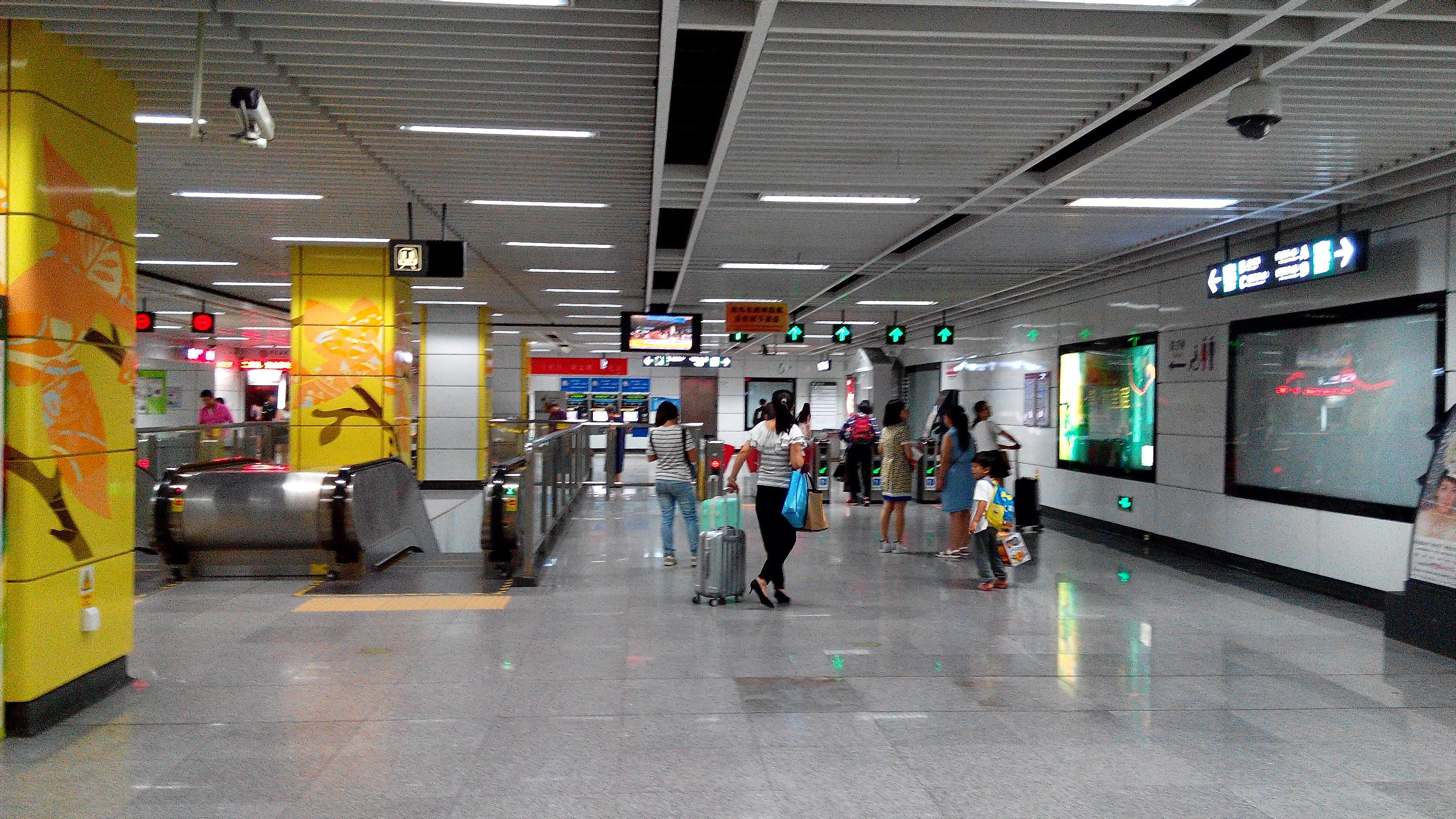 深圳地铁三号线 益田站大堂